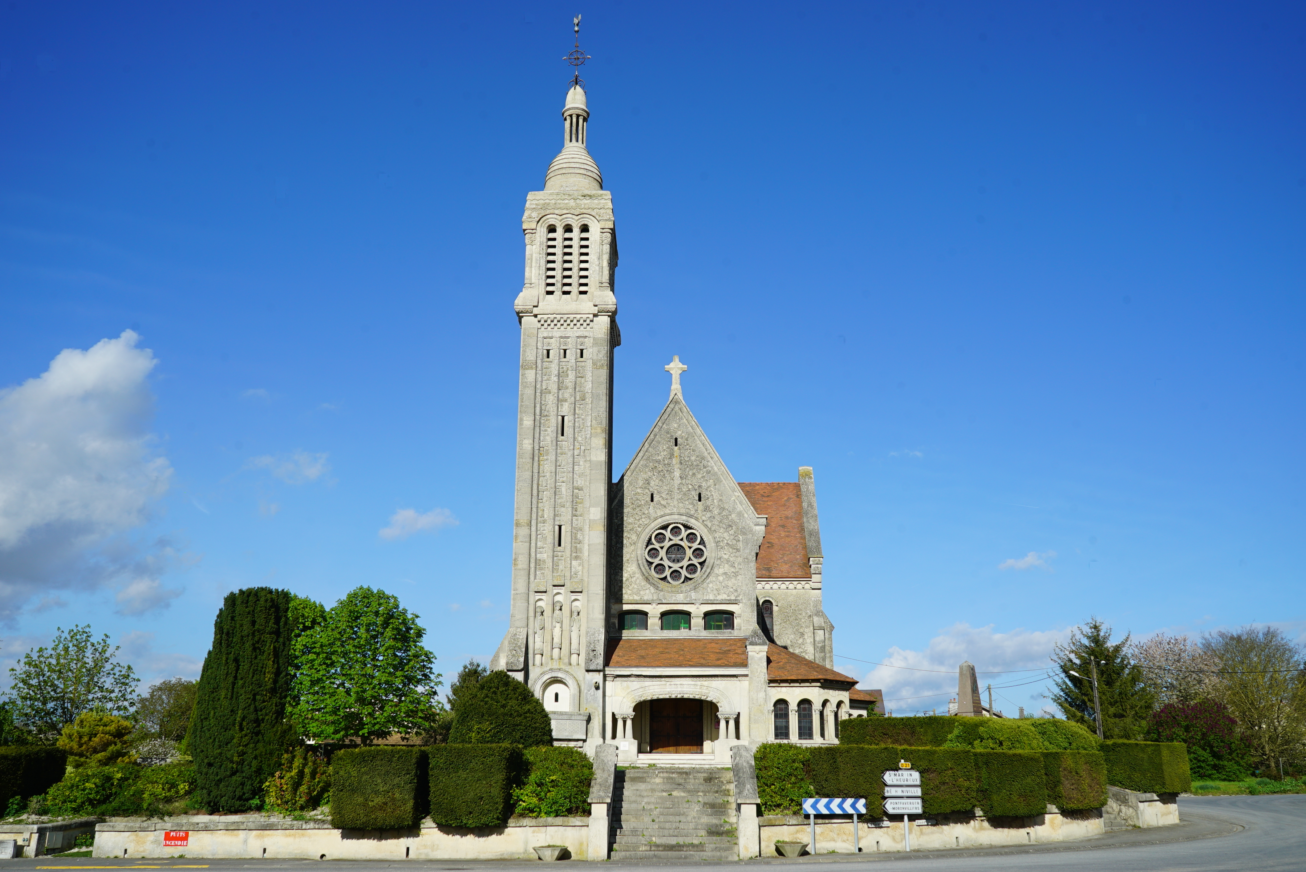 à l'occasion du "centenaire de la bataille des monts de champagne".